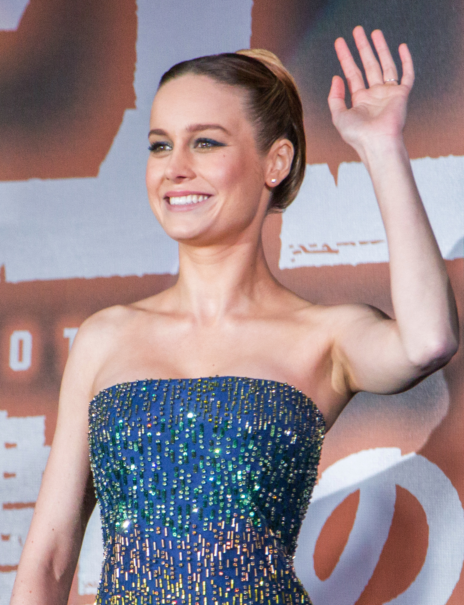 キングコング: 髑髏島の巨神 ジャパンプレミア レッドカーペット トム・ヒドルストン ブリー・ラーソン サミュエル・L・ジャクソン